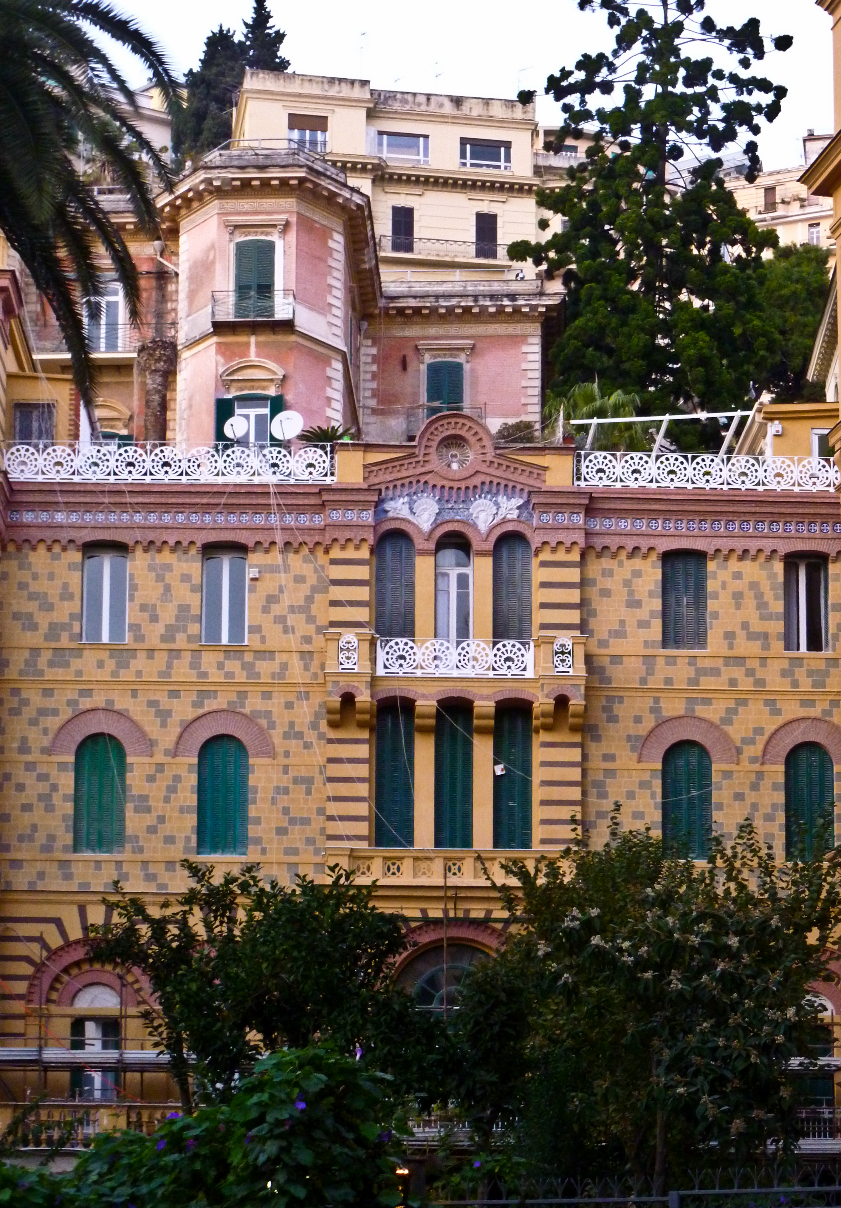 Villa Maria (Napoli)